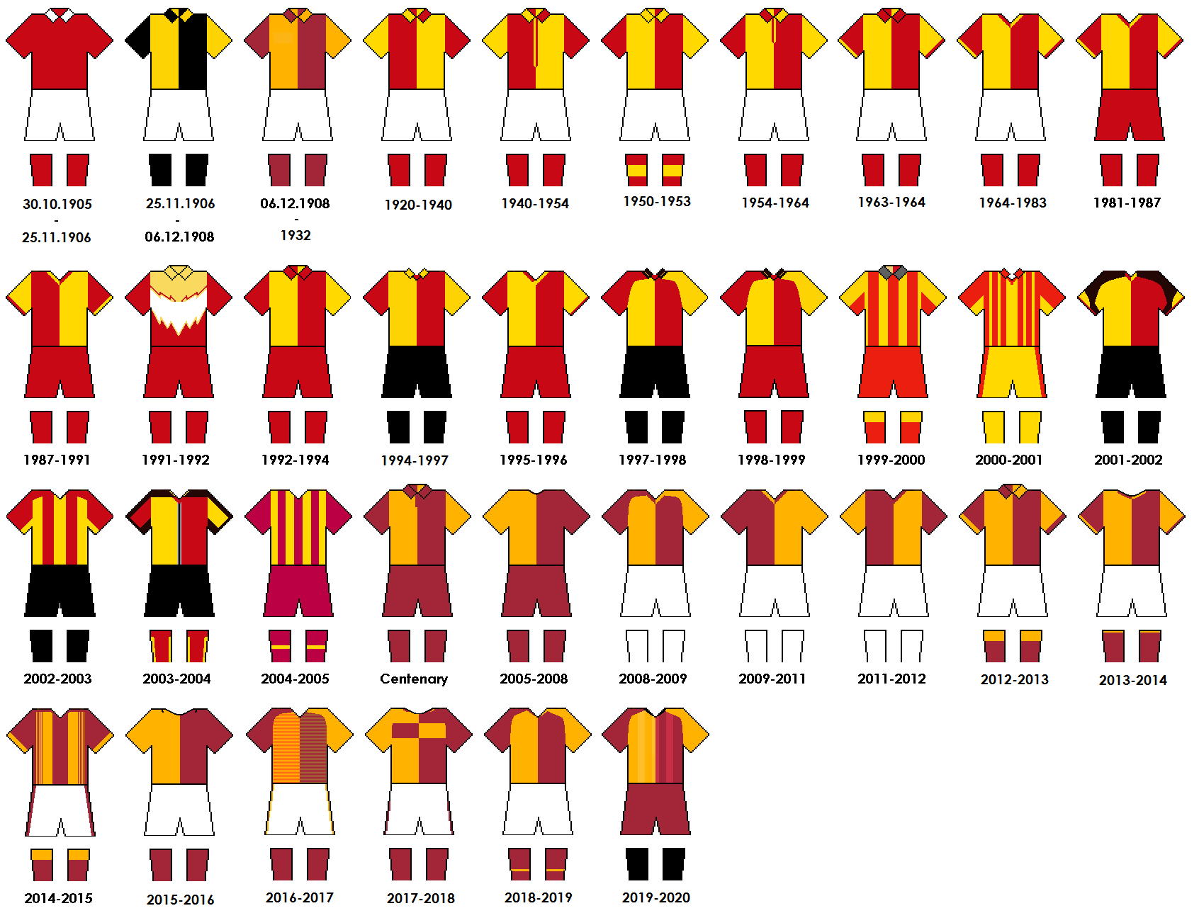 GalatasarayKitHistoryJuly2019